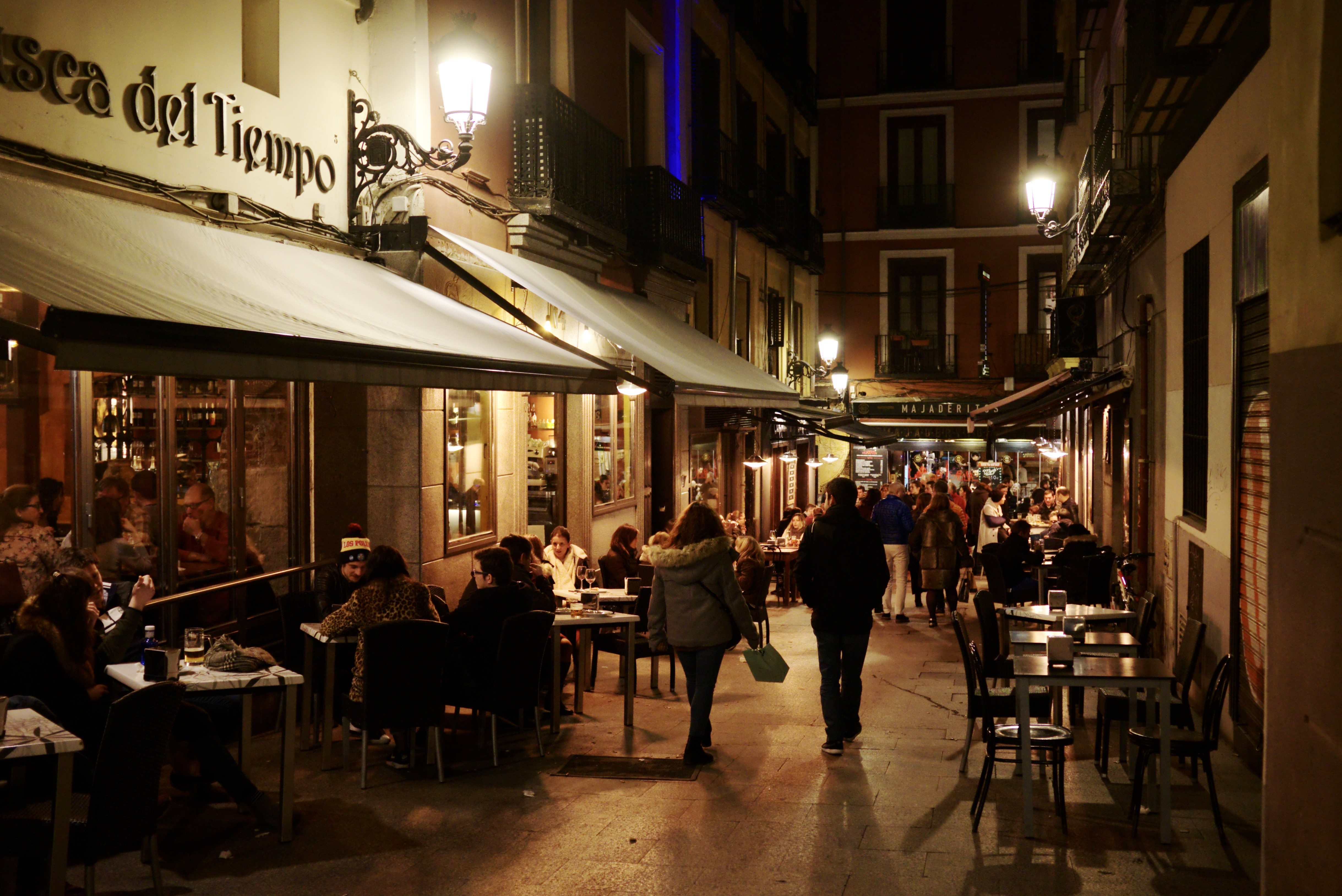 Madrid